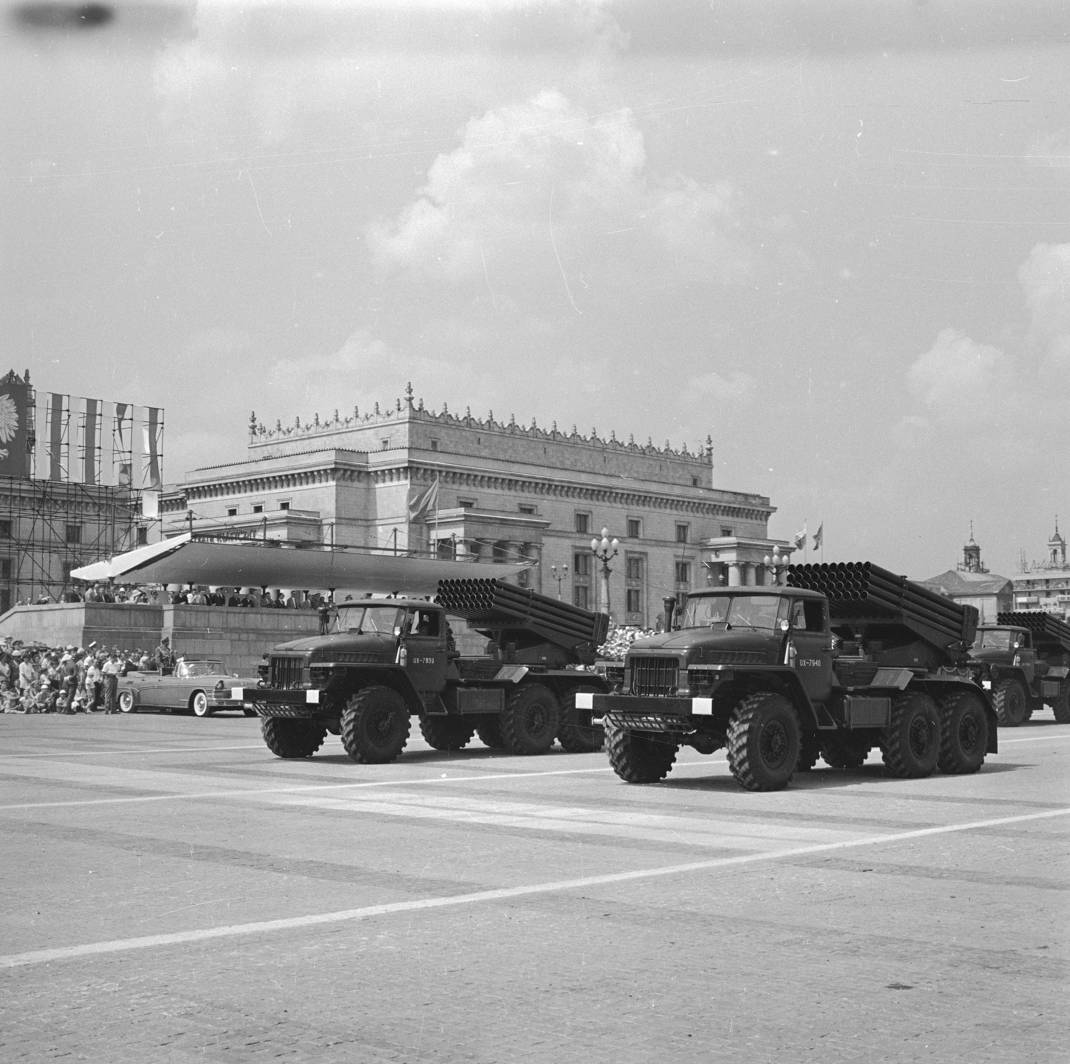 Wyrzutne rakiet BM-21 "Grad" na samochodach Ural 375D.